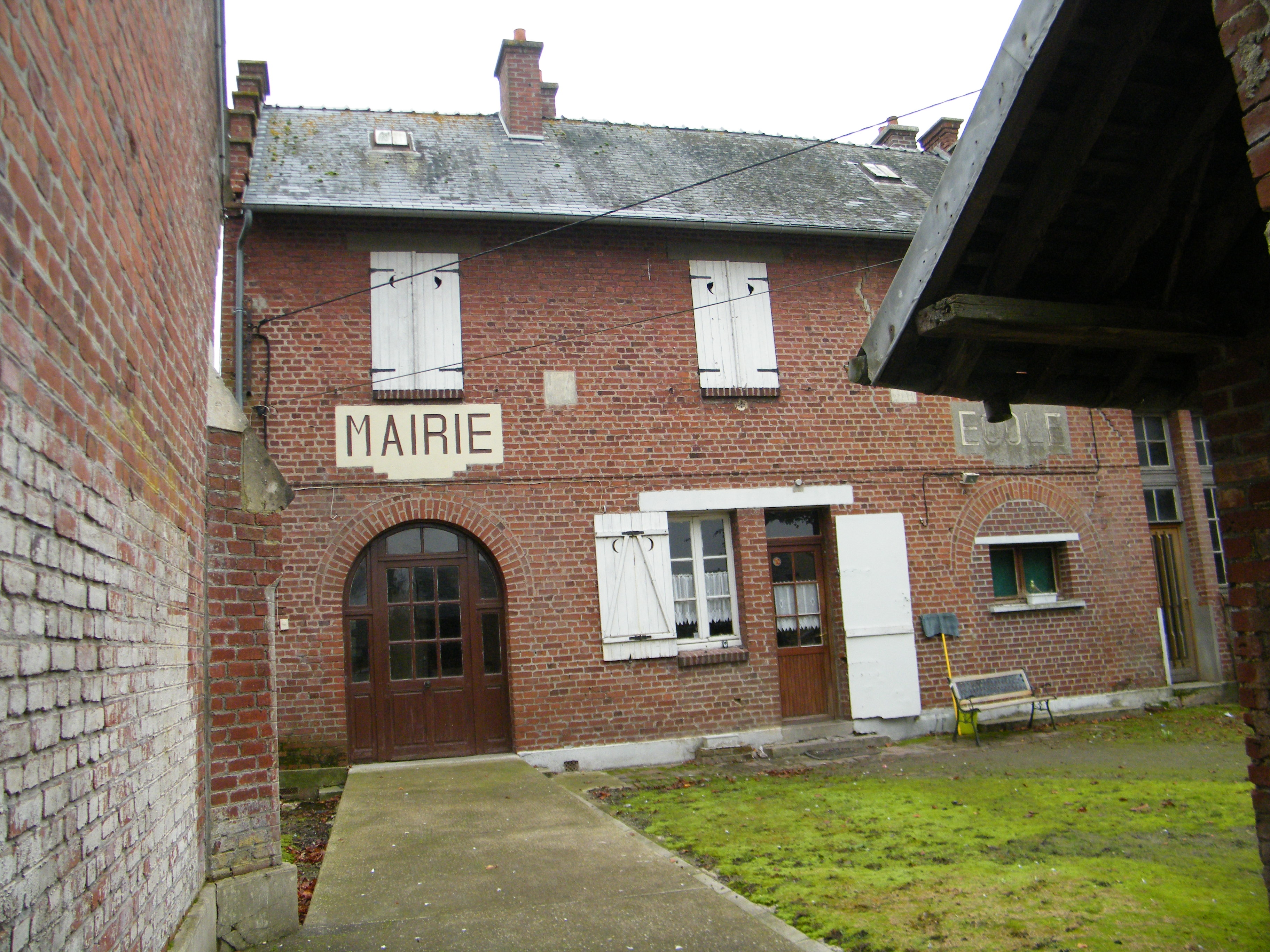 Mairie-école.